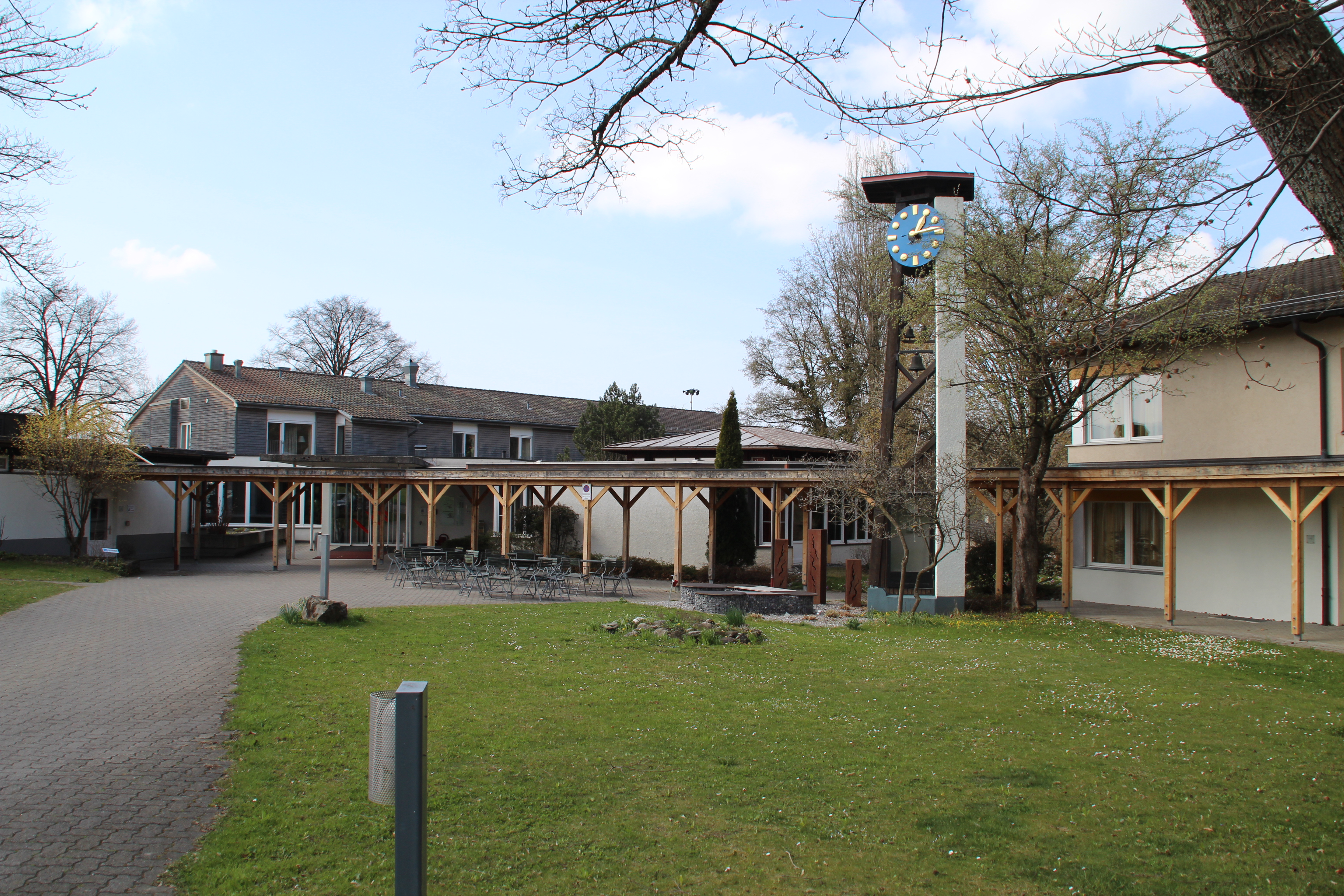 Tagungszentrum Boldern oberhalb Männedorf